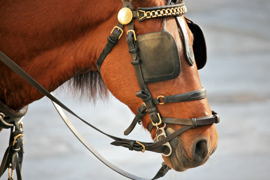 Horse Blinkers